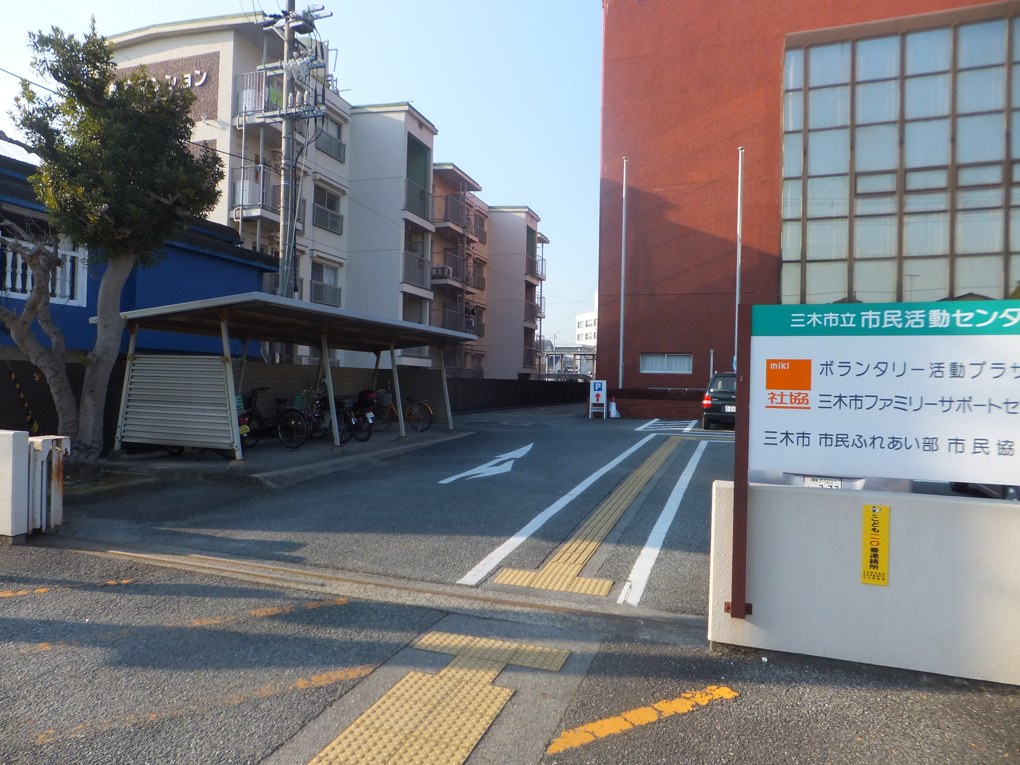 三木市立市民活動センター 2013年